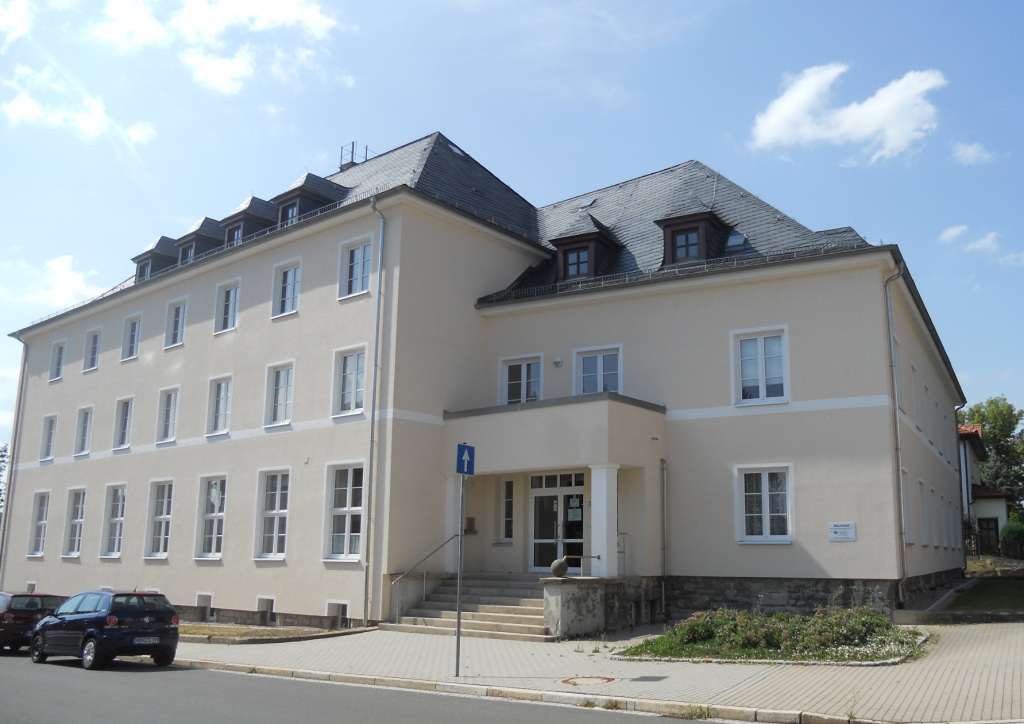 Das renovierte und modernisierte Alumnat des Hennebergischen Gymnasiums.